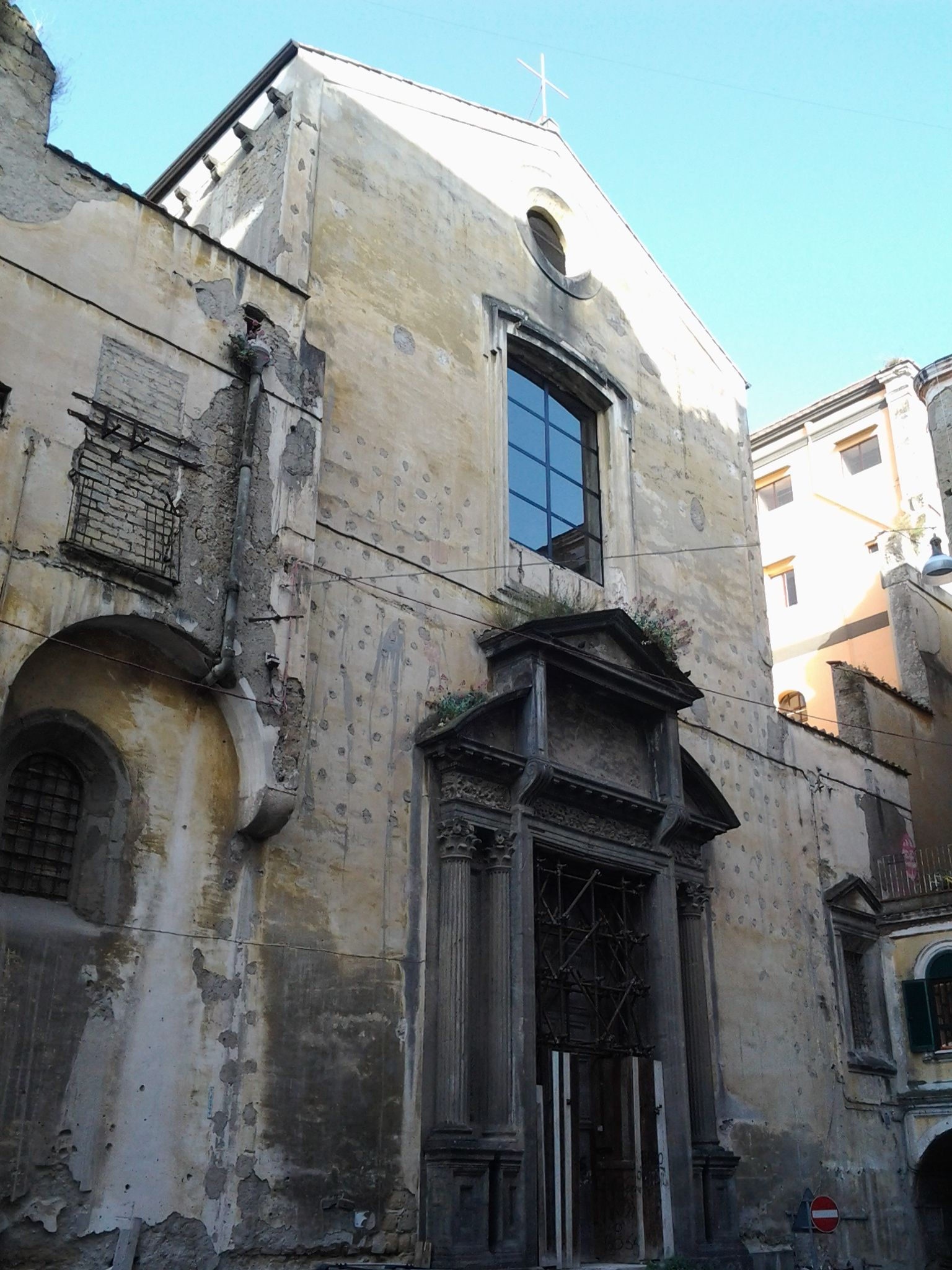 Facciata Grazie a Caponapoli, Napoli